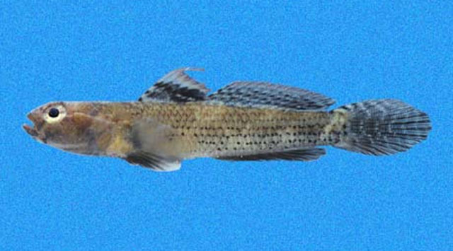 Aboma etheostoma, Panama